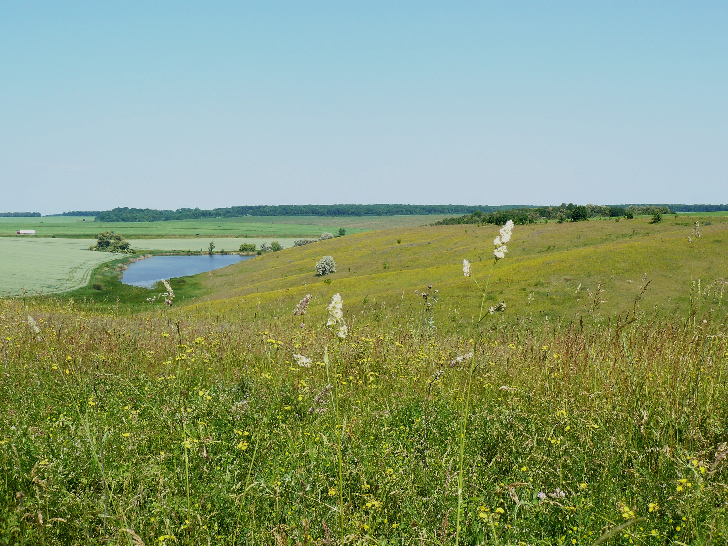 Витоки Гнилого Тікича.Ставок. Ставок створено у 19 ст поміщиками Браницькими. У 1939 внаслідок повені греблю було зруйновано.Відновили її у 1960 р.